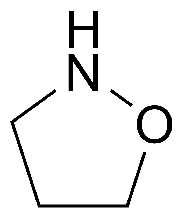 Isoxazolidine